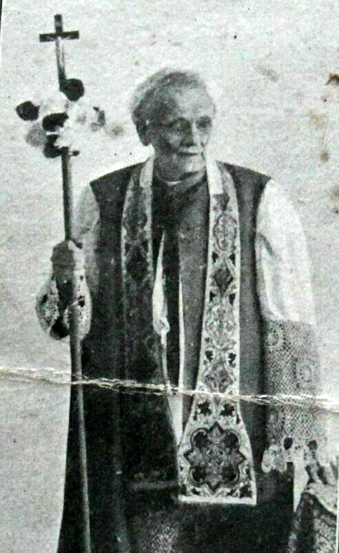 Ks. Antoni Gruszecki foto obrazek z jubileuszu